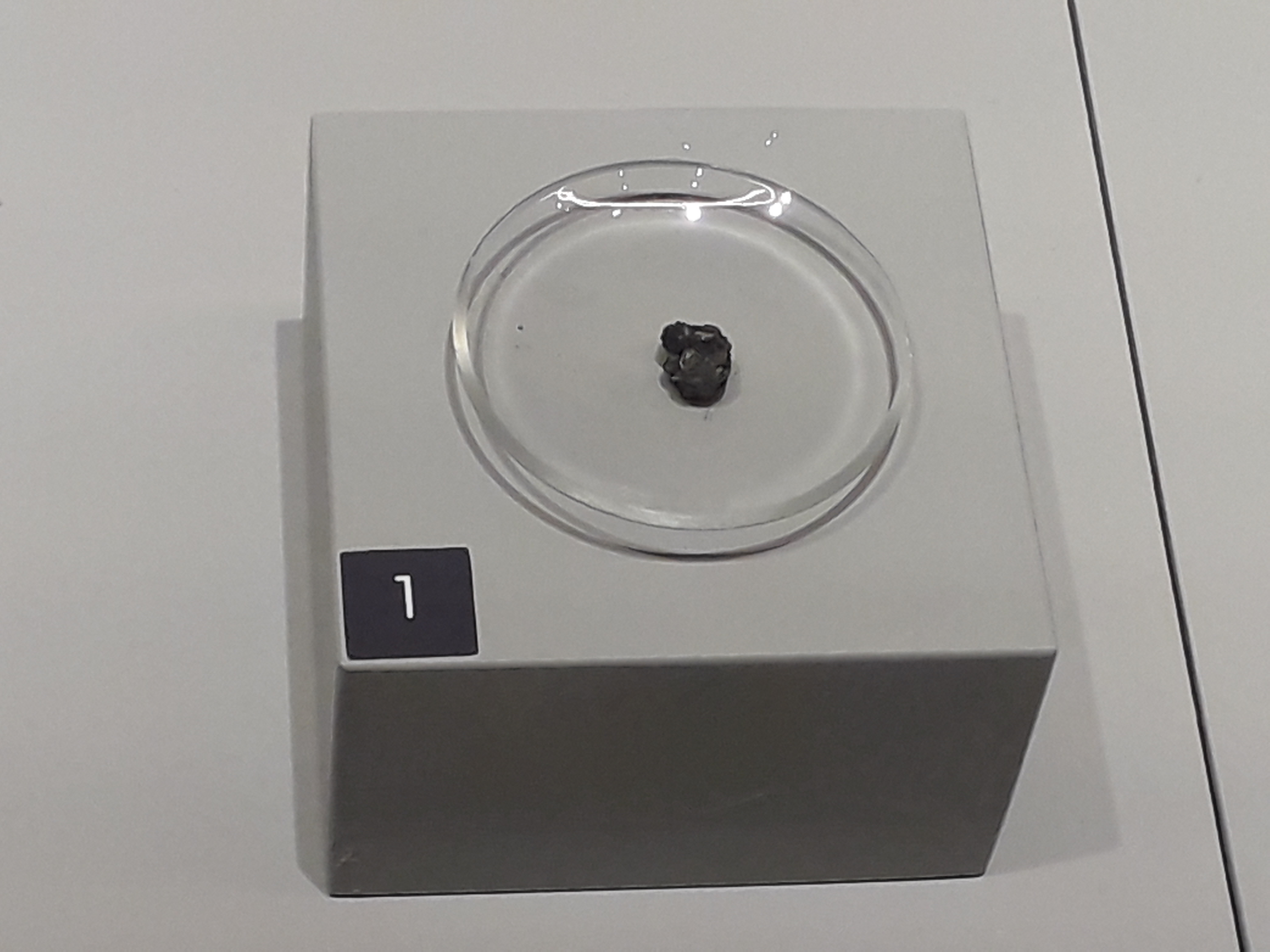 Météorite "Alais", tombée en France en 1806. Chondrite carbonée (CI1). Comme les autres météorites du même type, la météorite d'Alais est extrêmement précieuse, car sa composition chimique est identique, pour la plupart des éléments, à celle du Soleil. Malheureusement, il ne reste que quelques grammes de ce trésor tombé en 1806. Exposée à Paris à l'occasion de l'exposition "Météorites", dans le bâtiment de la grande galerie de l'évolution, au Muséum national d'histoire naturelle de Paris (18 octobre 2017 - 10 juin 2018).